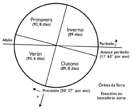 Órbita da Terra